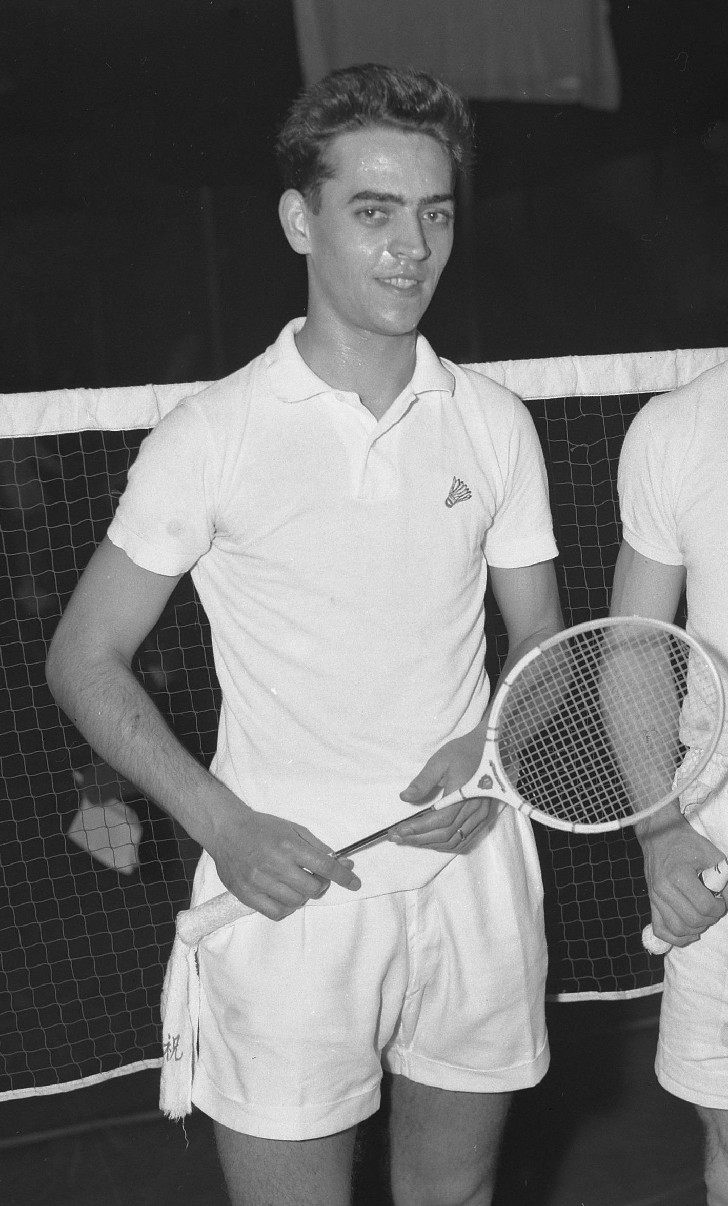 Internationale kampioenschap badminton Haarlem. J. Hammergaard Hansen, Denemarken